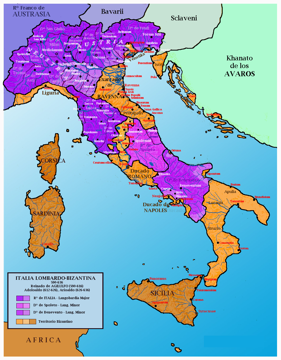 Mapa Italia Lombardo-Bizantina 590-636